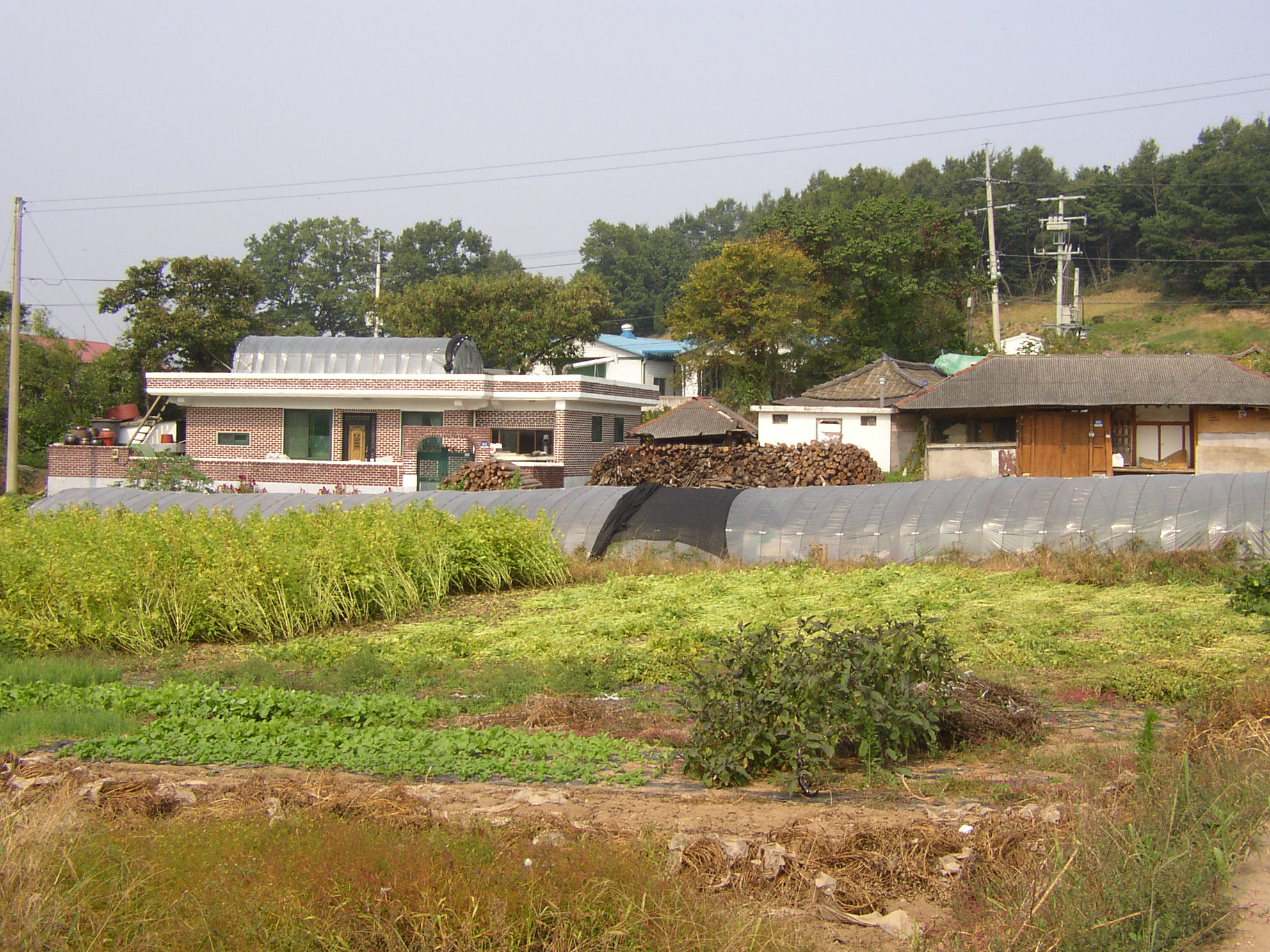 용인시 처인구 모현면 시골 풍경